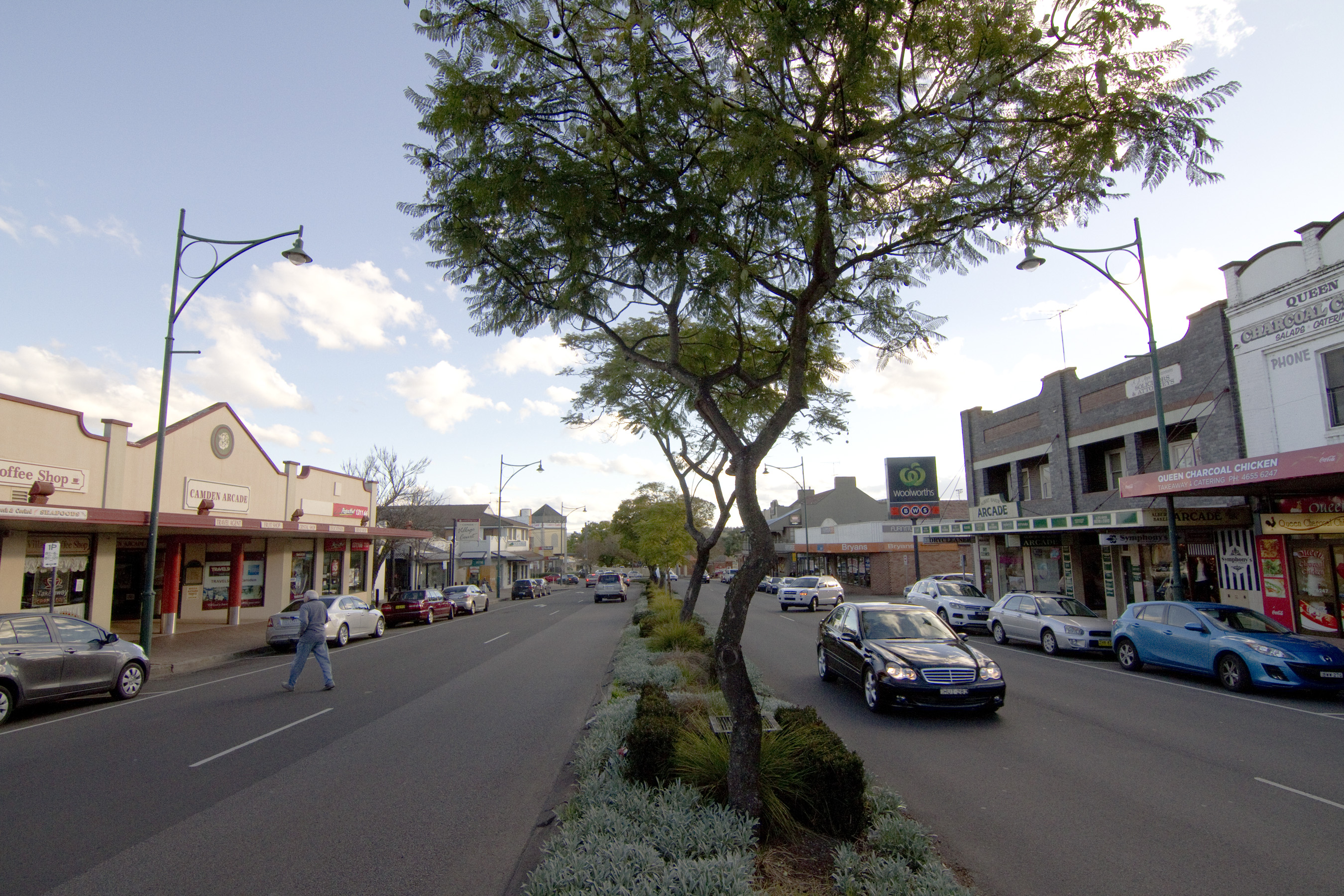 Camden NSW 2570, Australia